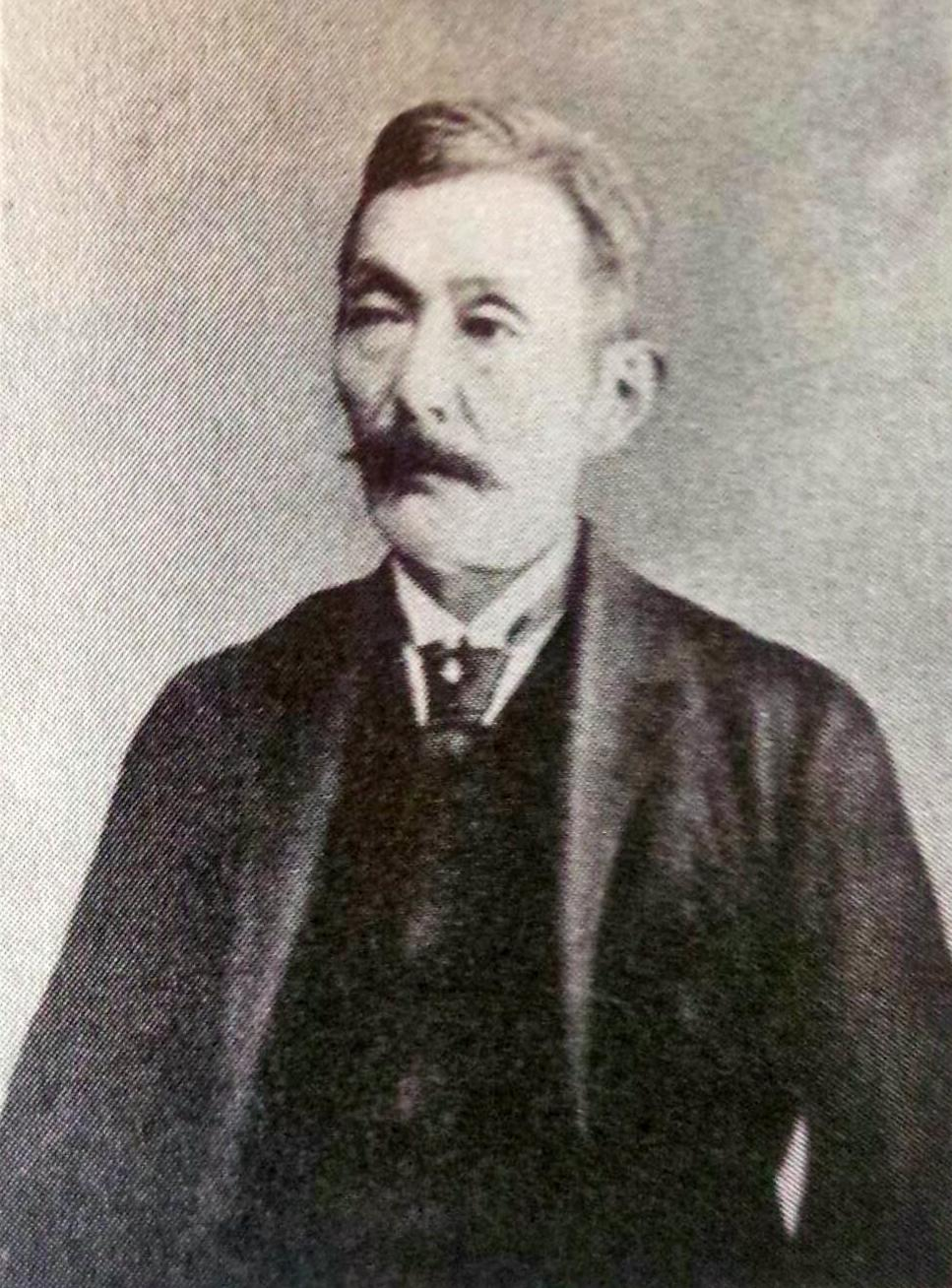 大塚霍之丞（賀久治）